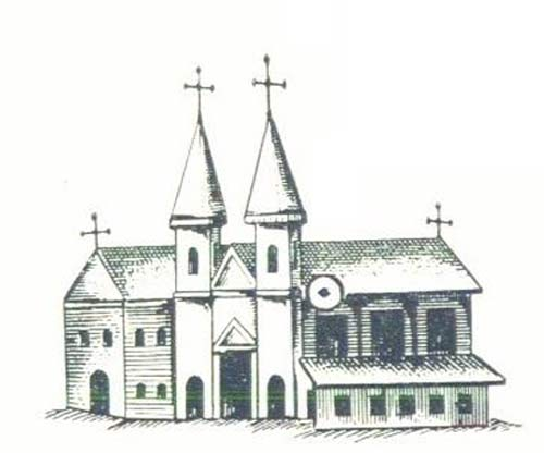 Беларуская (тарашкевіца): Мікулін (Mikulin). Касьцёл і кляштар бэрнардынаў